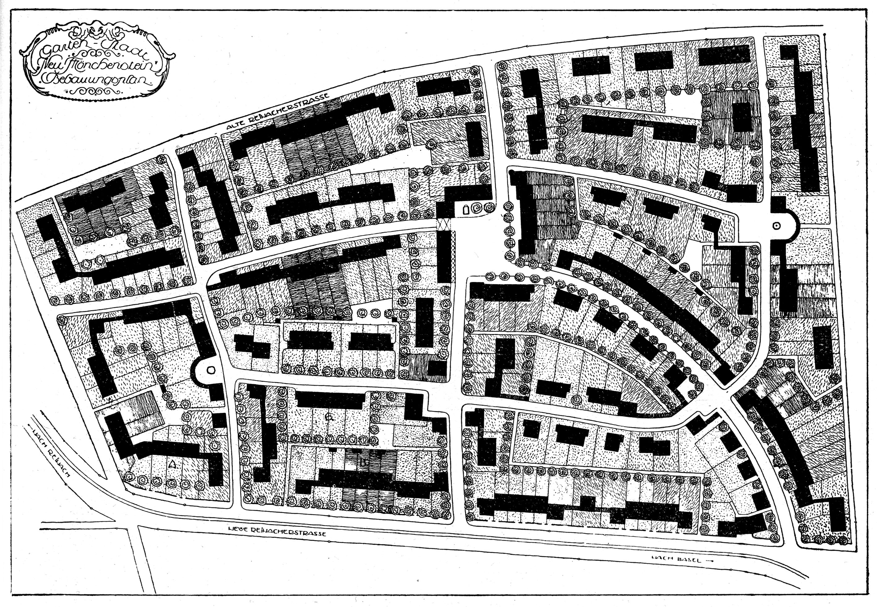 Plan der Gartenstadt Münchenstein (Schweiz, Kanton Basel-Landschaft) von Architekt Emil Dettwiler, publiziert im Jahr 1912.